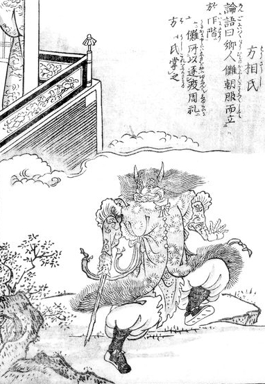 Hōsōshi (方相氏) from the Konjaku Hyakki Shūi (今昔百鬼拾遺)